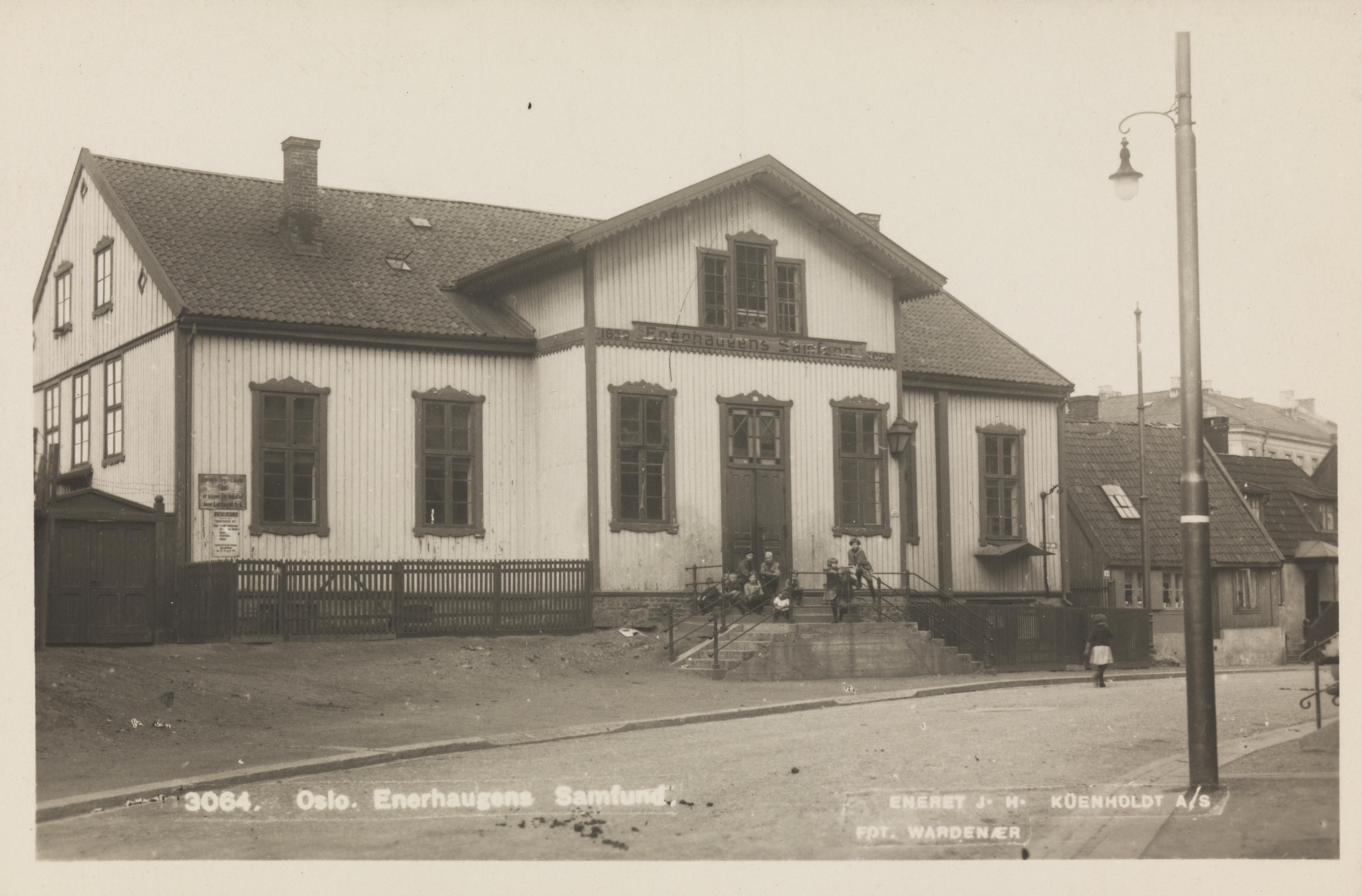 Bildet er hentet fra Nasjonalbibliotekets bildesamling Enerhaugen, Oslo. Enerhaugens Samfund lå i Smedgata 38.